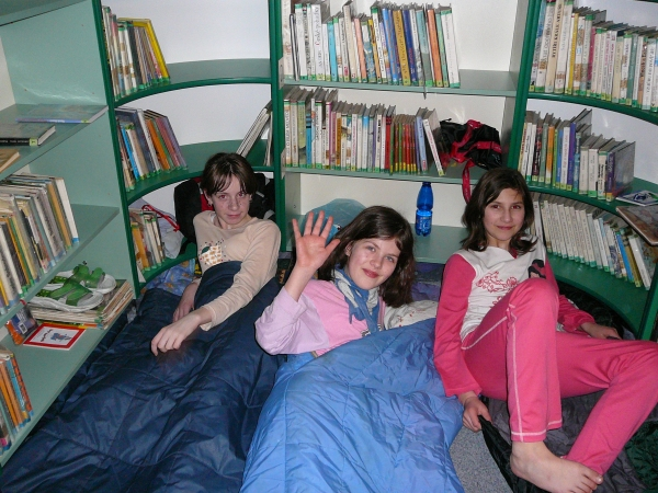 Knihovna Třinec - oddělení pro děti